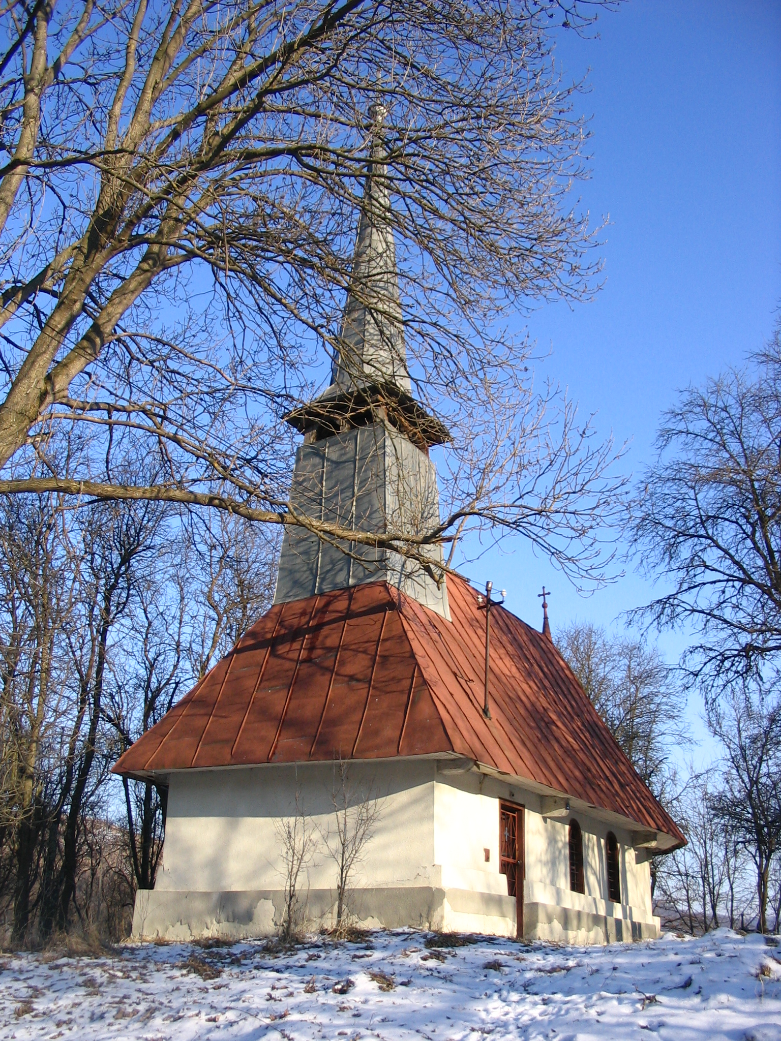 Biserica de lemn din Cubleşu